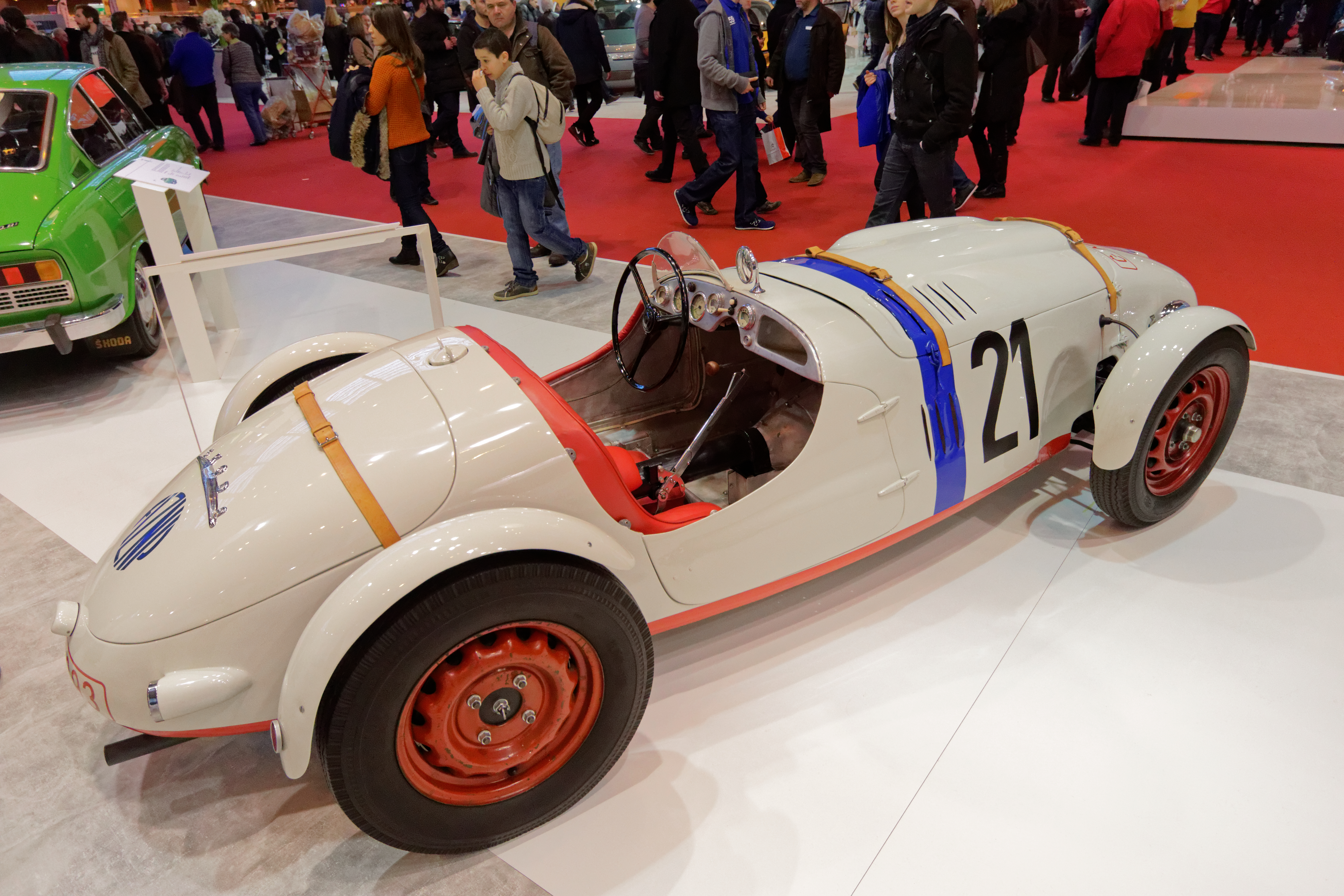 Une des voiture présentée lors du salon Rétromobile de Paris 2015